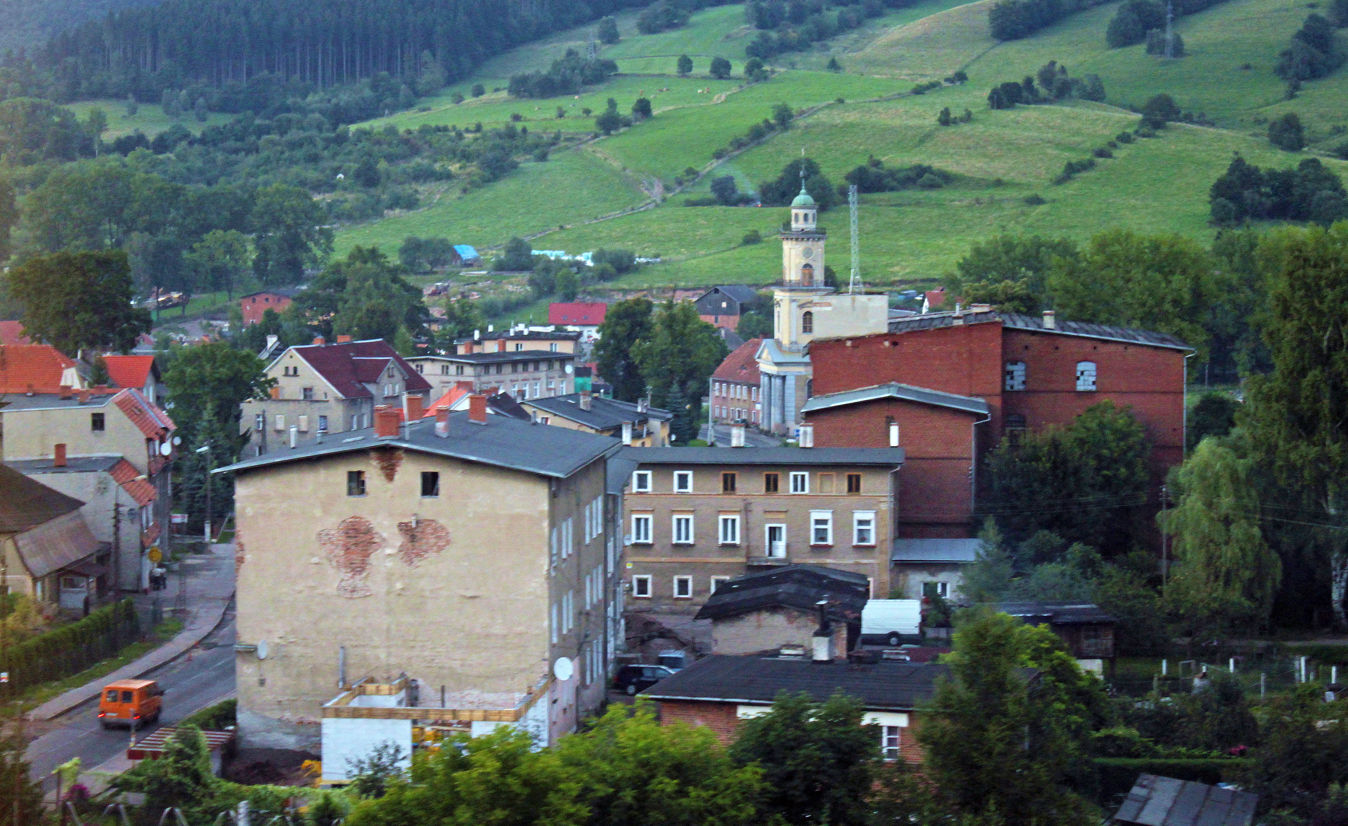 Panorama miasta Głuszyca.